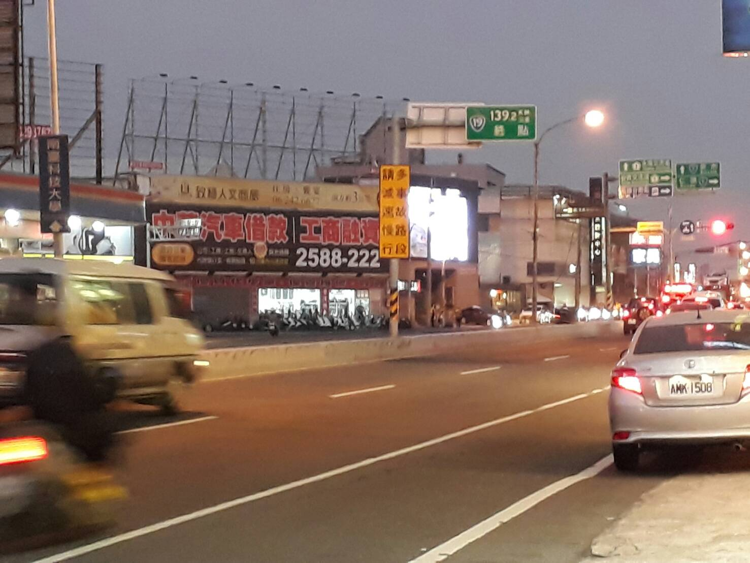 中文（台灣）: 台19線永康，往終點拍攝